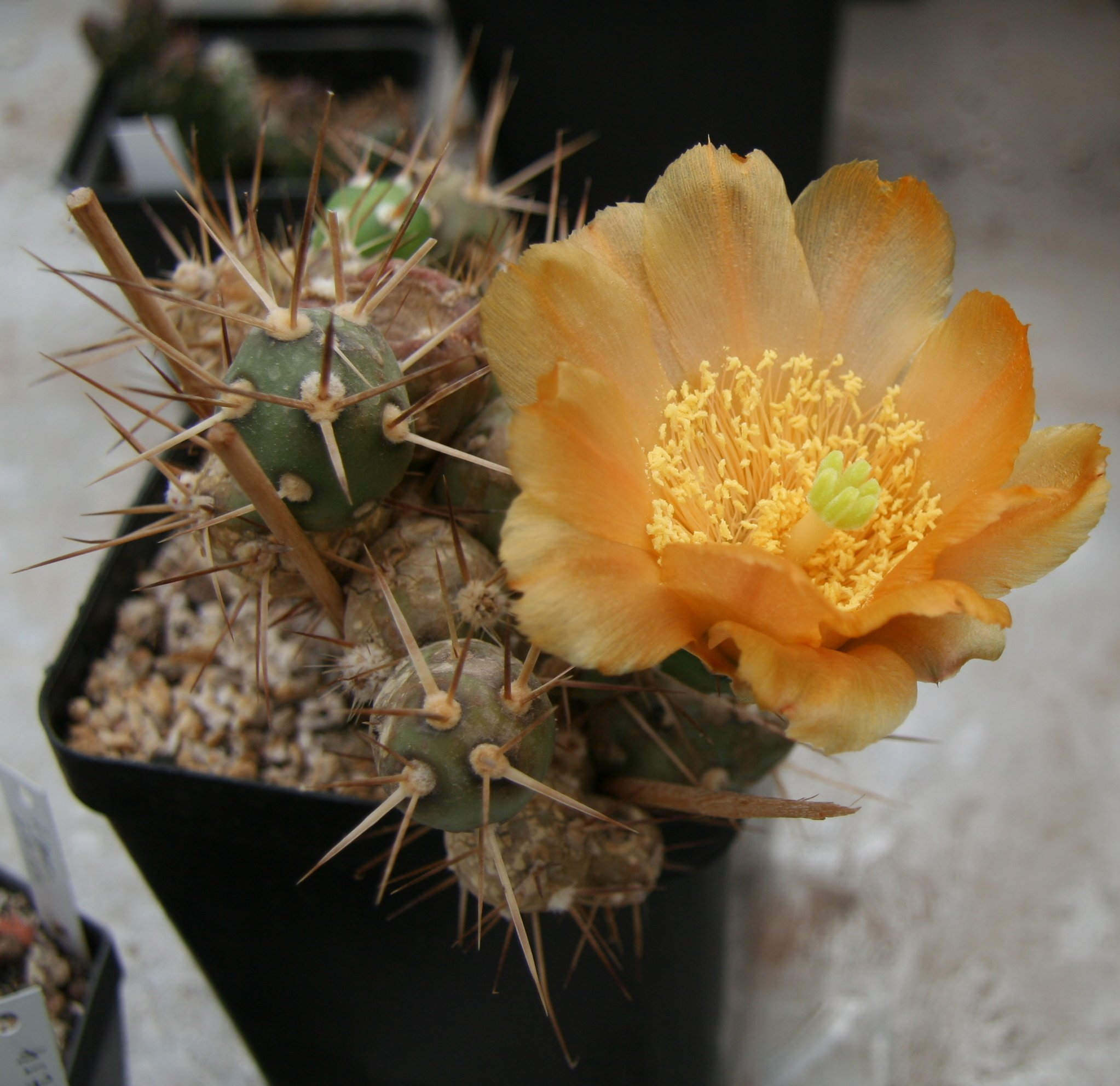 Maihueniopsis darwinii in Kultur